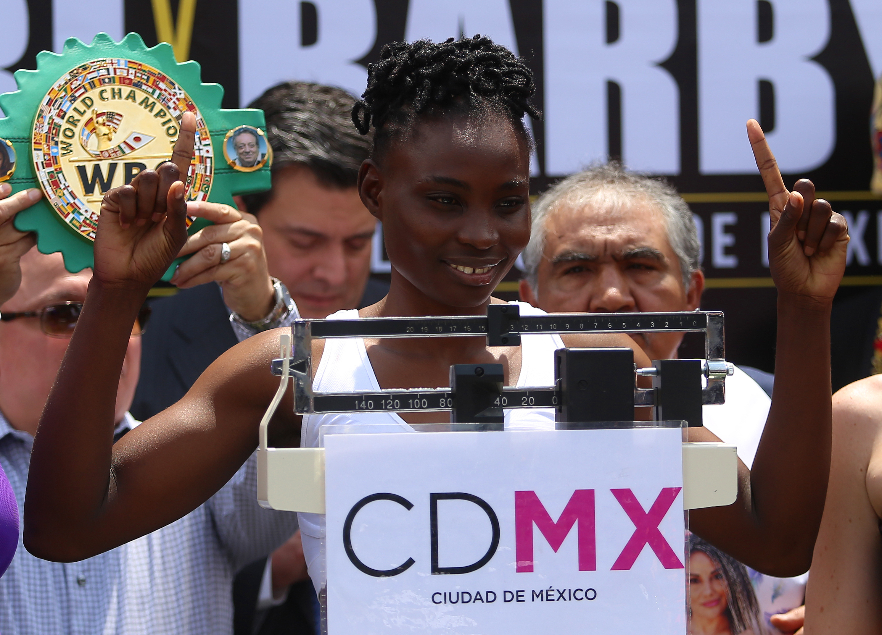 Presentación Función de Box Zócalo